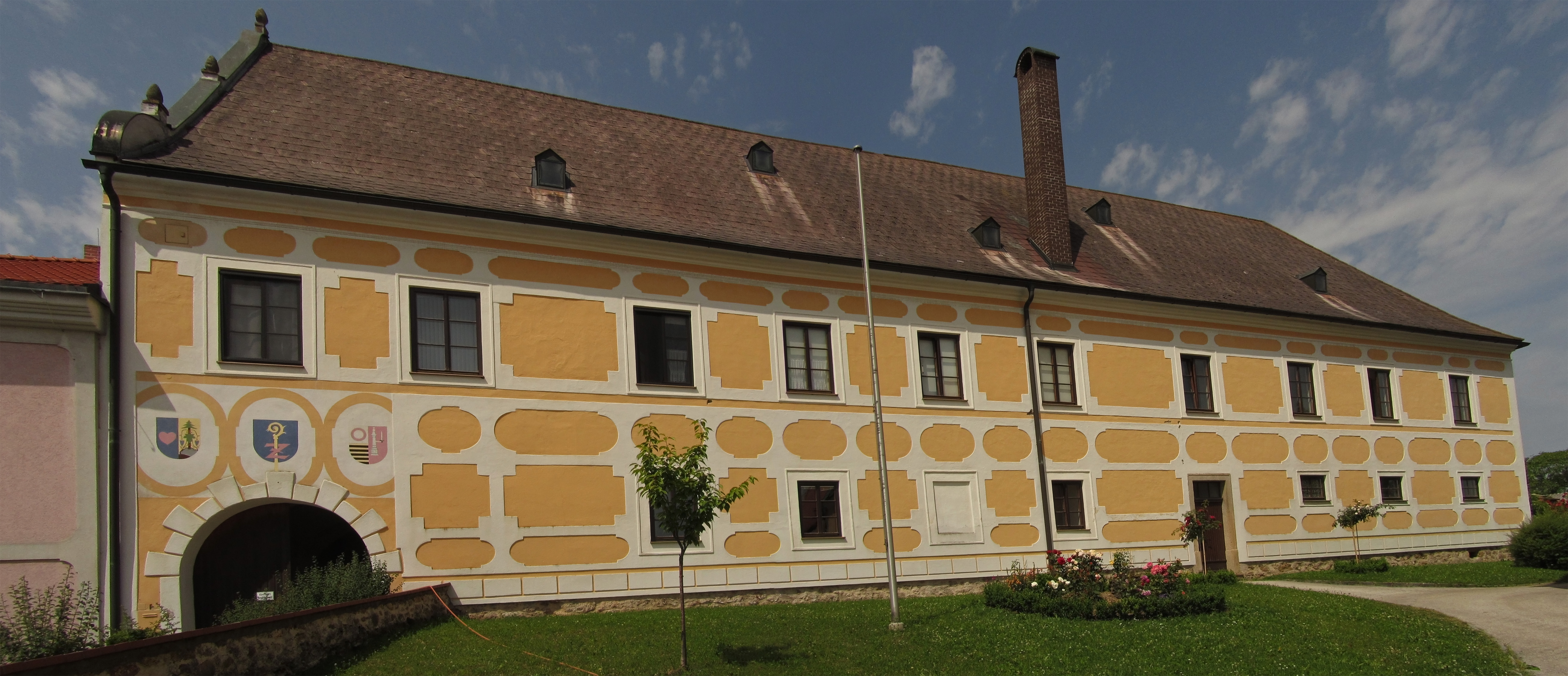 Pfarrhof in Großschönau - Der Pfarrhof, ursprünglich ein Wehrbau, wurde von 1697 bis 1700 neu errichtet.